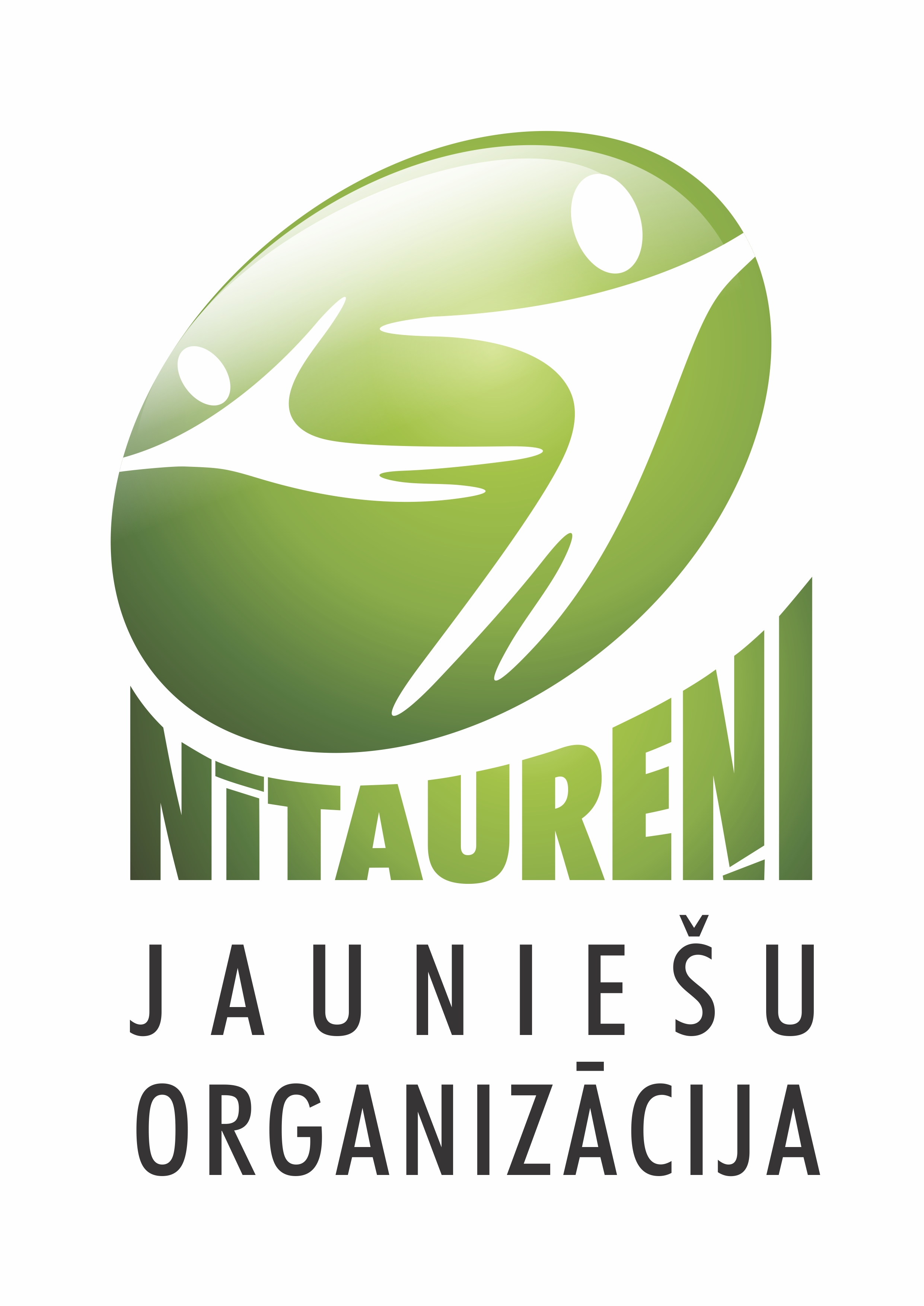 Biedrības logo